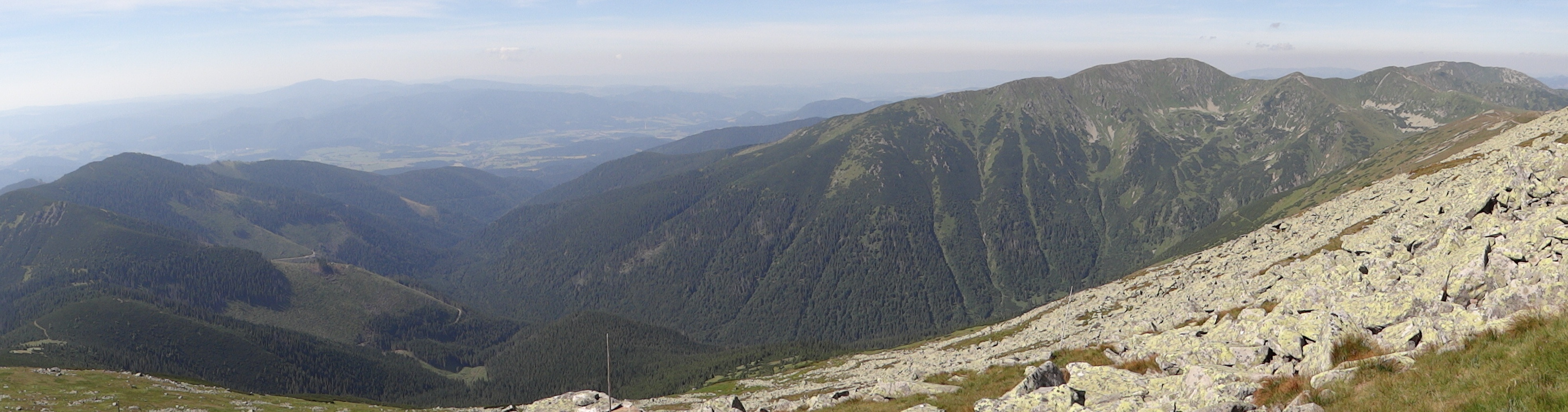 Dolina Vajskovska